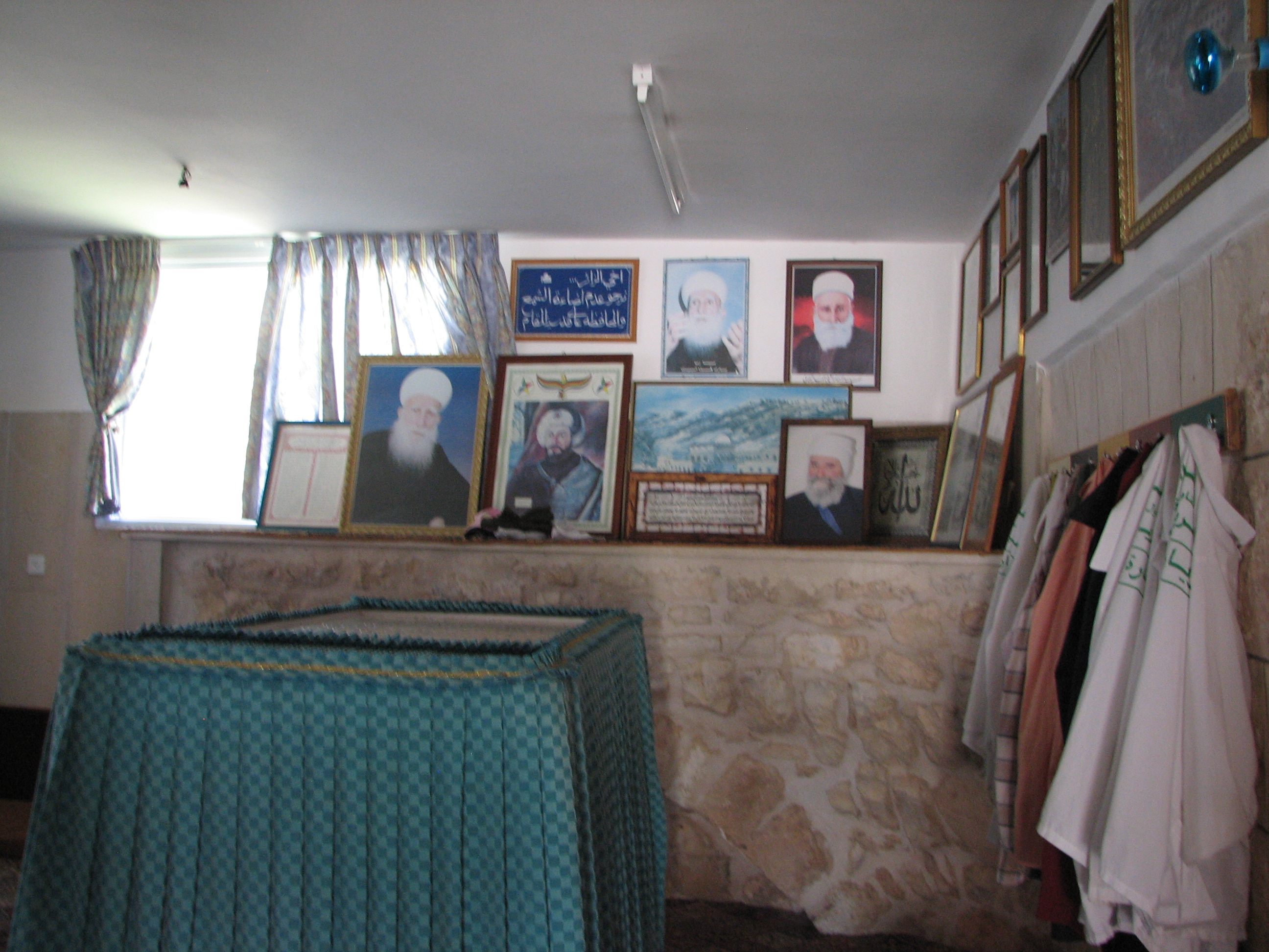 Grave of Sheikh Ali Fares in Julis Northern District of Israel. הקבר של שיח אעלי פארס הקבר שוכן ביישוב ג'וליס בגליל מתחם הקבר משמש גם כאנדרטה לחללי צה"ל בני העדה הדרוזית מג'וליס.